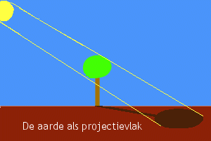 Projectie van een boom door de zon.